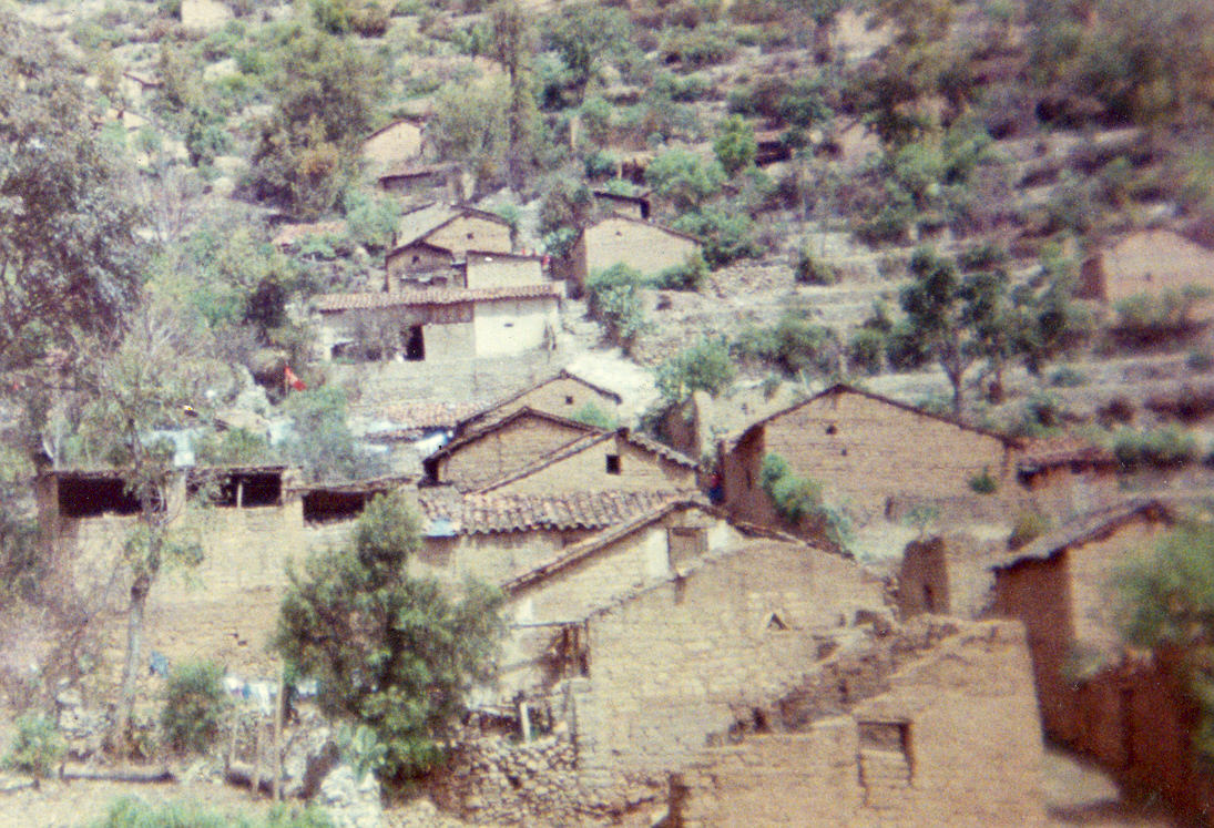 Vista de Apongo.